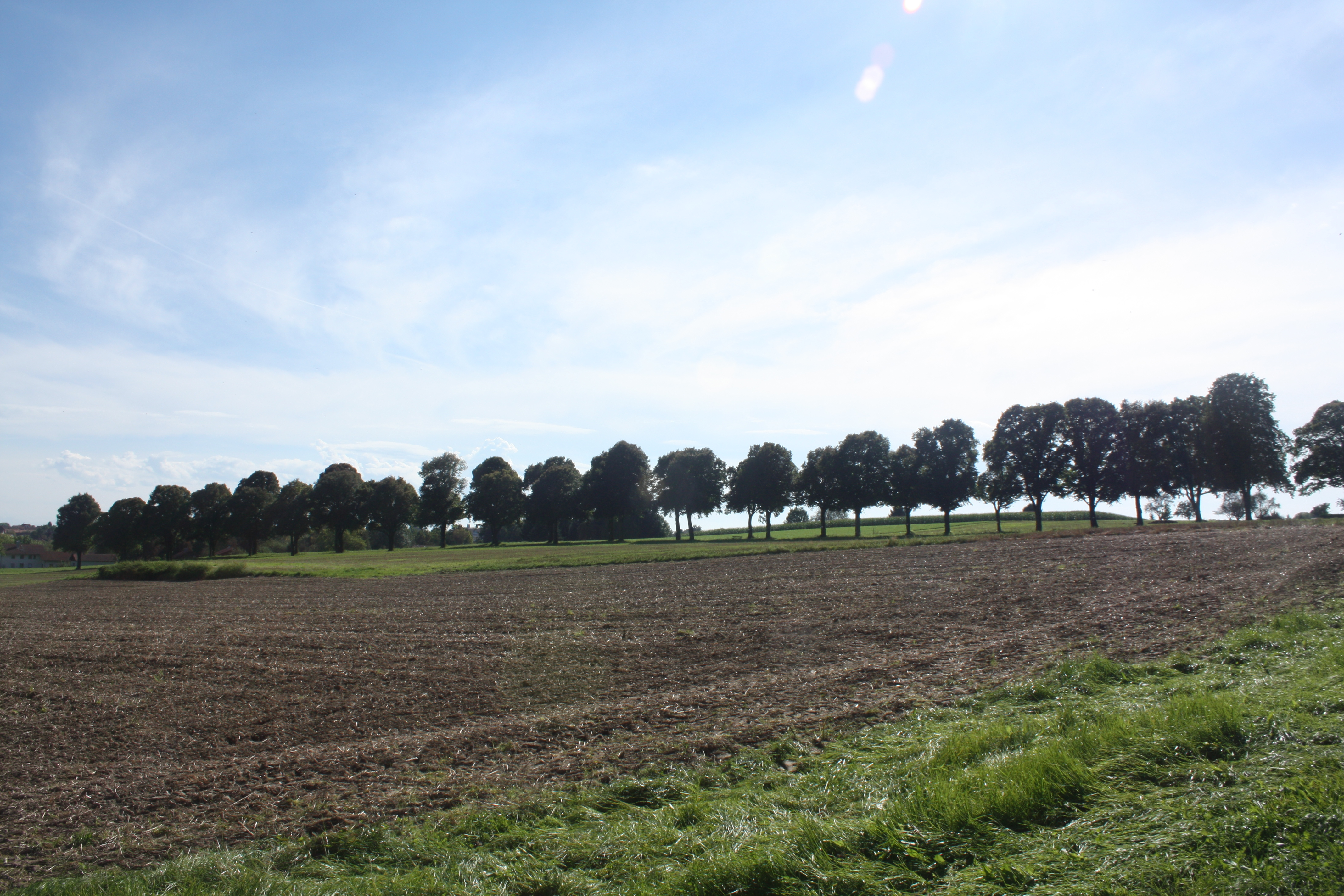 Heldenallee Ebersberg, Mahnmal für die Gefallenen der Stadt im Ersten Weltkrieg